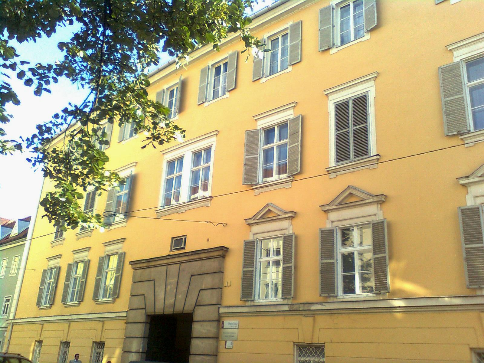 Ehemaliges Bischöfliches Palais vom Bischofplatz aus gesehen. Heute befinden sich in den Räumlichkeiten das Bischöfliche Ordinariat der Diözese Graz-Seckau